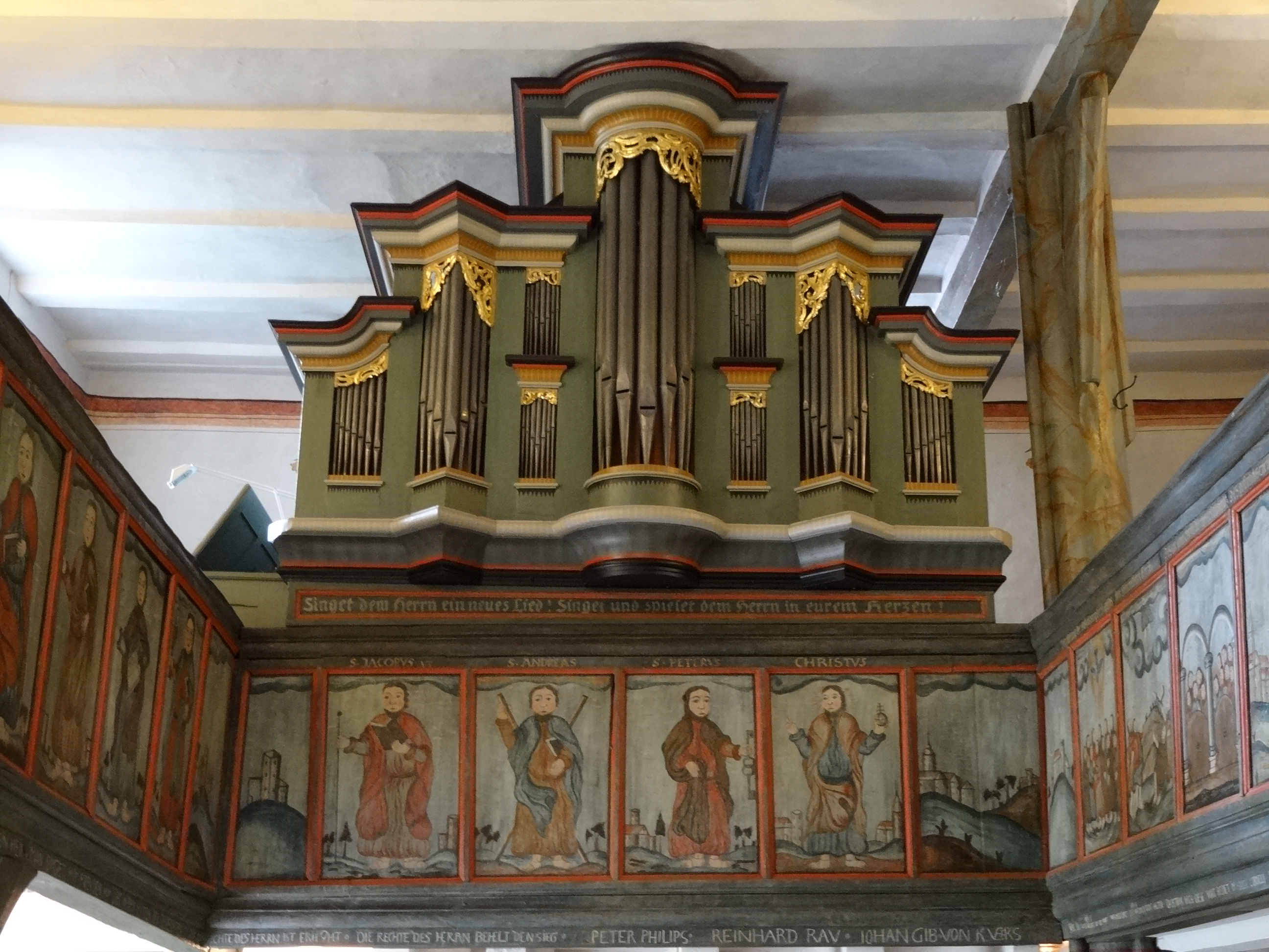 Evangelische Kirche (Heuchelheim, Hessen)